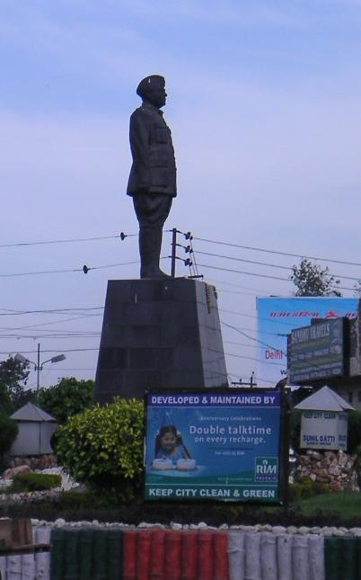 Netaji statue in Amritsar. Photo: Soman